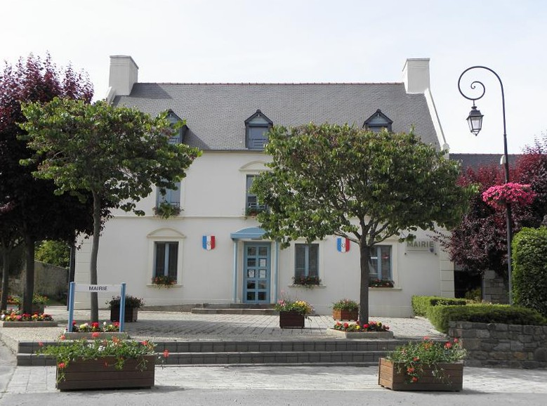 Mairie de Baguer-Morvan (35).